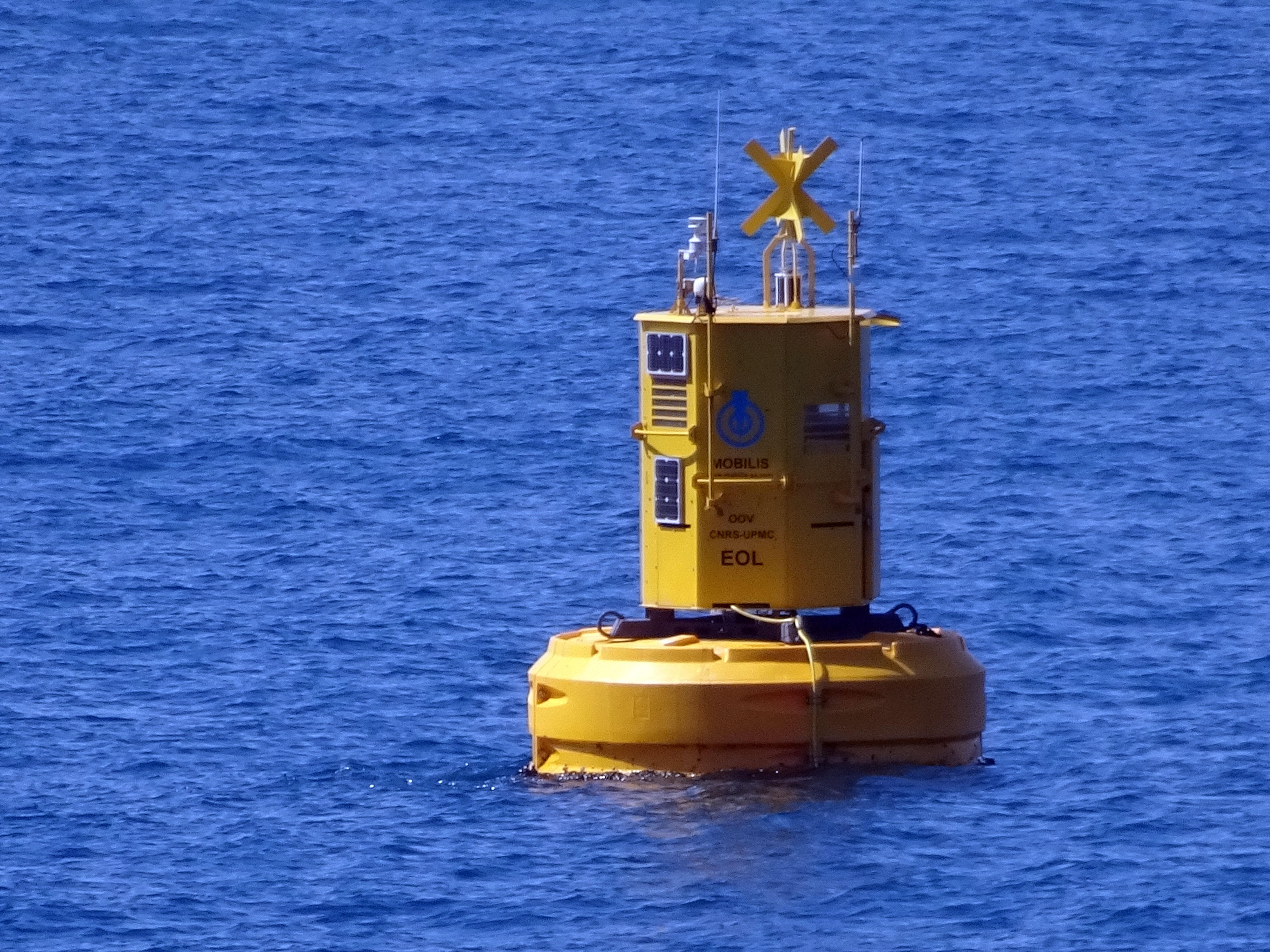 Balade Saint-Jean-Cap-Ferrat, avril 2019. Bouée d’acquisition de données installée par l'Observatoire Océanographique de Villefranche-sur-Mer (OOV) et développé par le CNRS, dans le cadre du projet EOL (Environnement Observable Littoral).